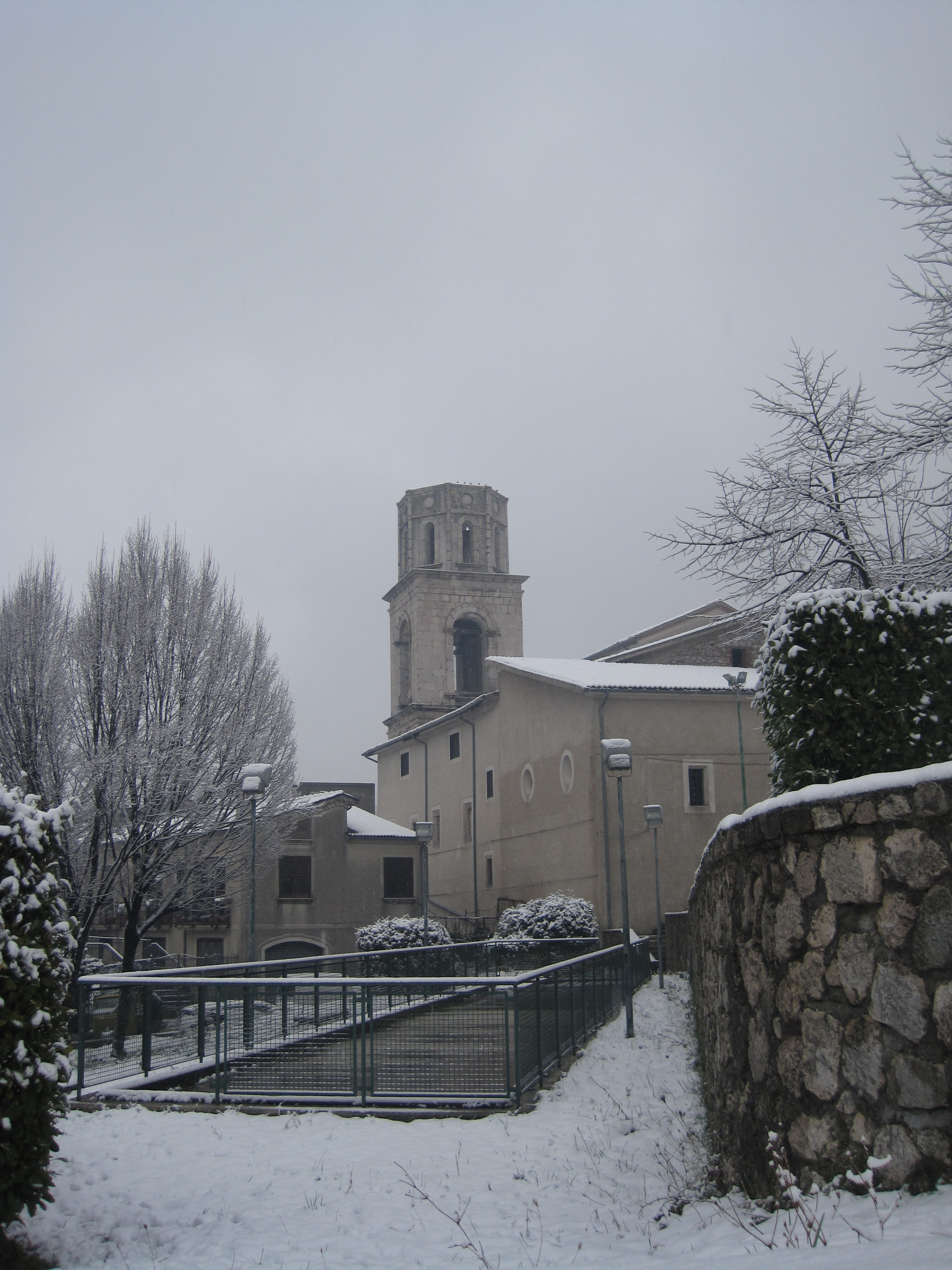 Foto scattata nel gennaio 2011, in occasione delle nevicate del periodo, nel centro di Bagnoli Irpino.